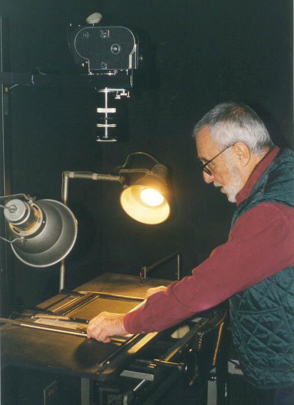 Osvaldo Cavandoli nel suo laboratorio davanti all'apparecchio dove realizzava le animazioni del suo cartone animato La Linea.